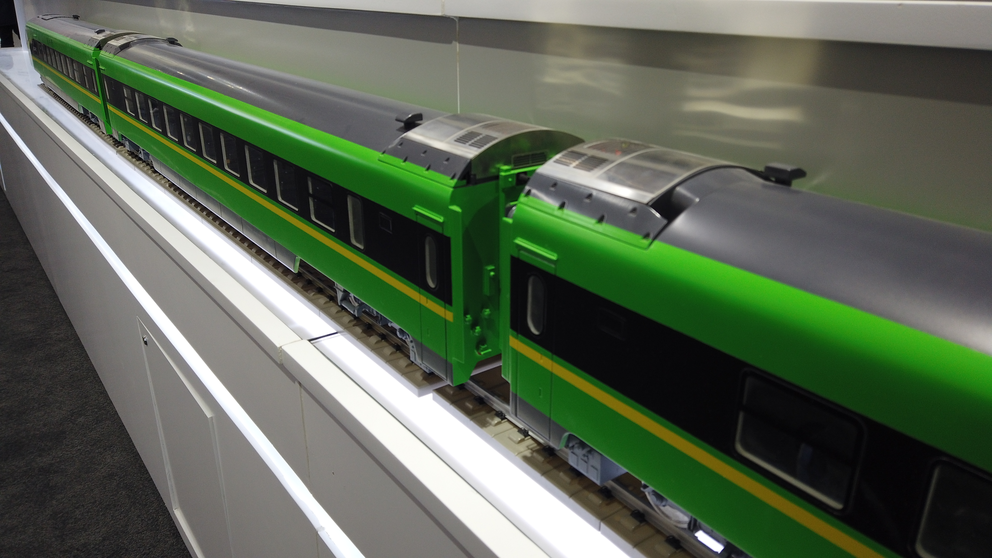 2019年初《中国铁路发展成就展》上展出的CR200J型动车组模型